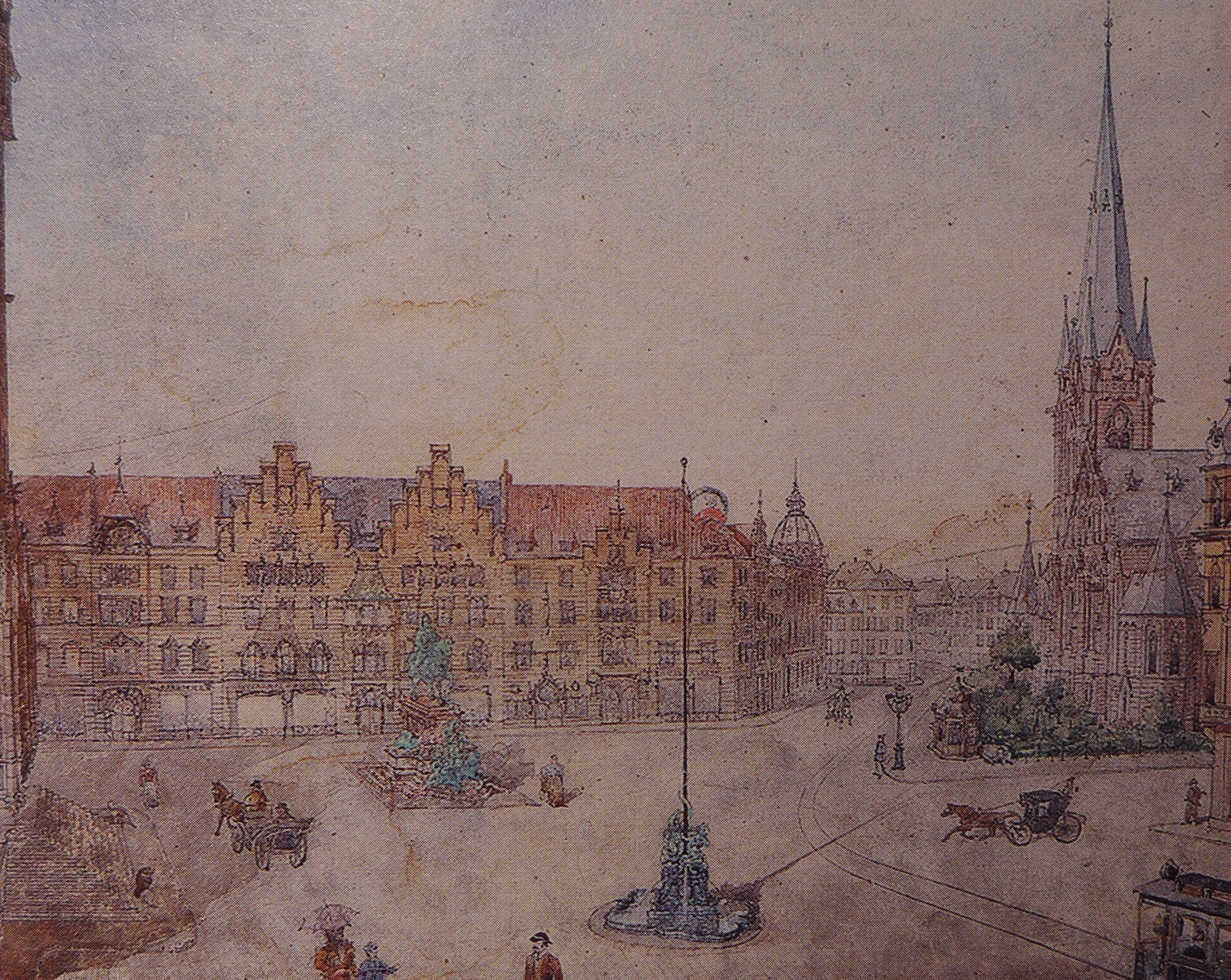 Vorentwurf Rathausplatz St.Johann (Stadtarchiv Saarbrücken)